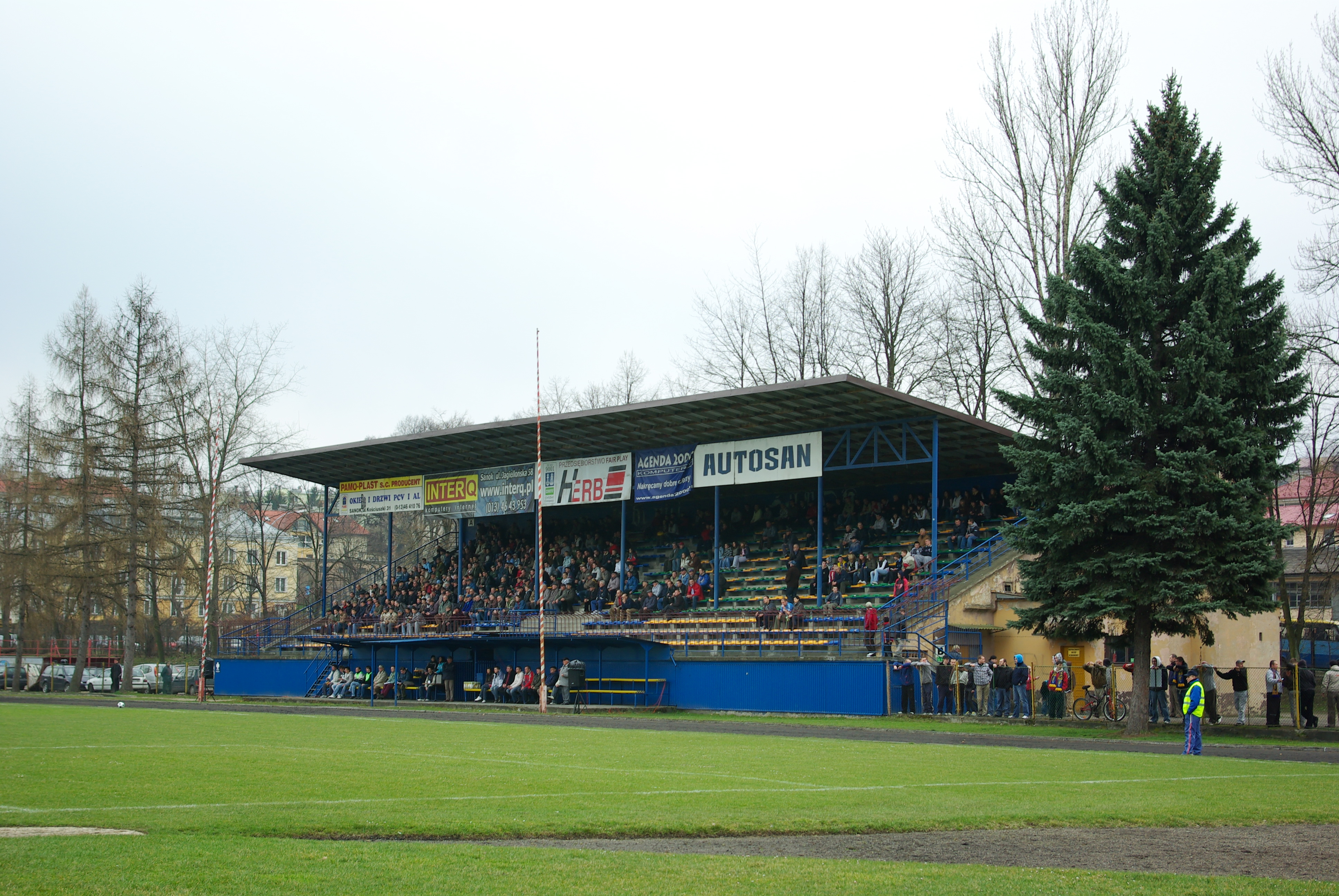 Trybuna stadionu Wierchy mecz Stal Sanok - Stal Mielec 29.03.2008